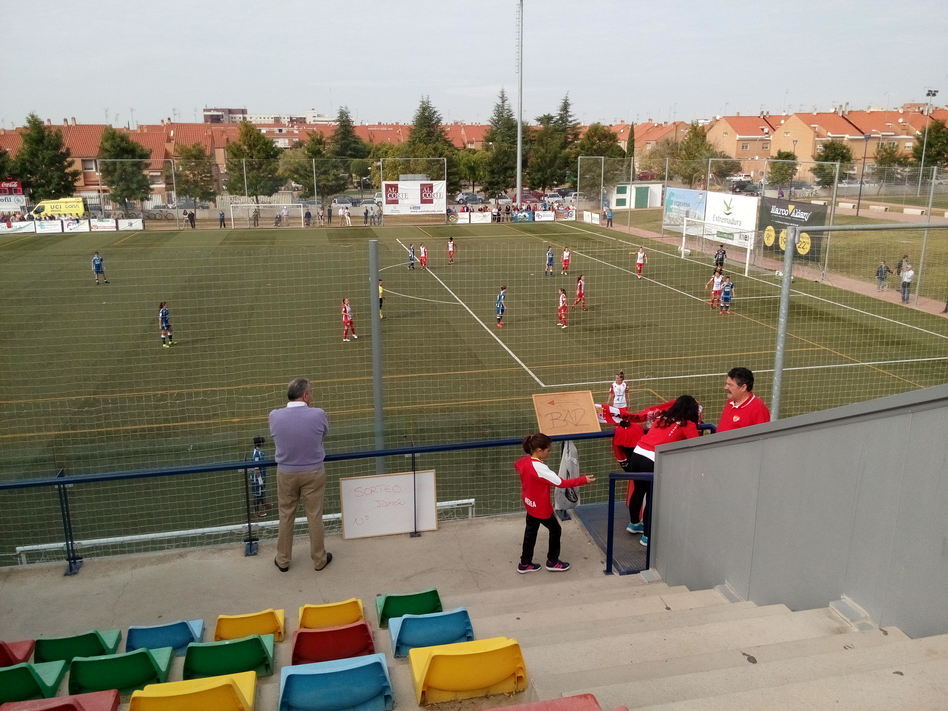 Imagen del partido Santa Teresa - Oiartzun